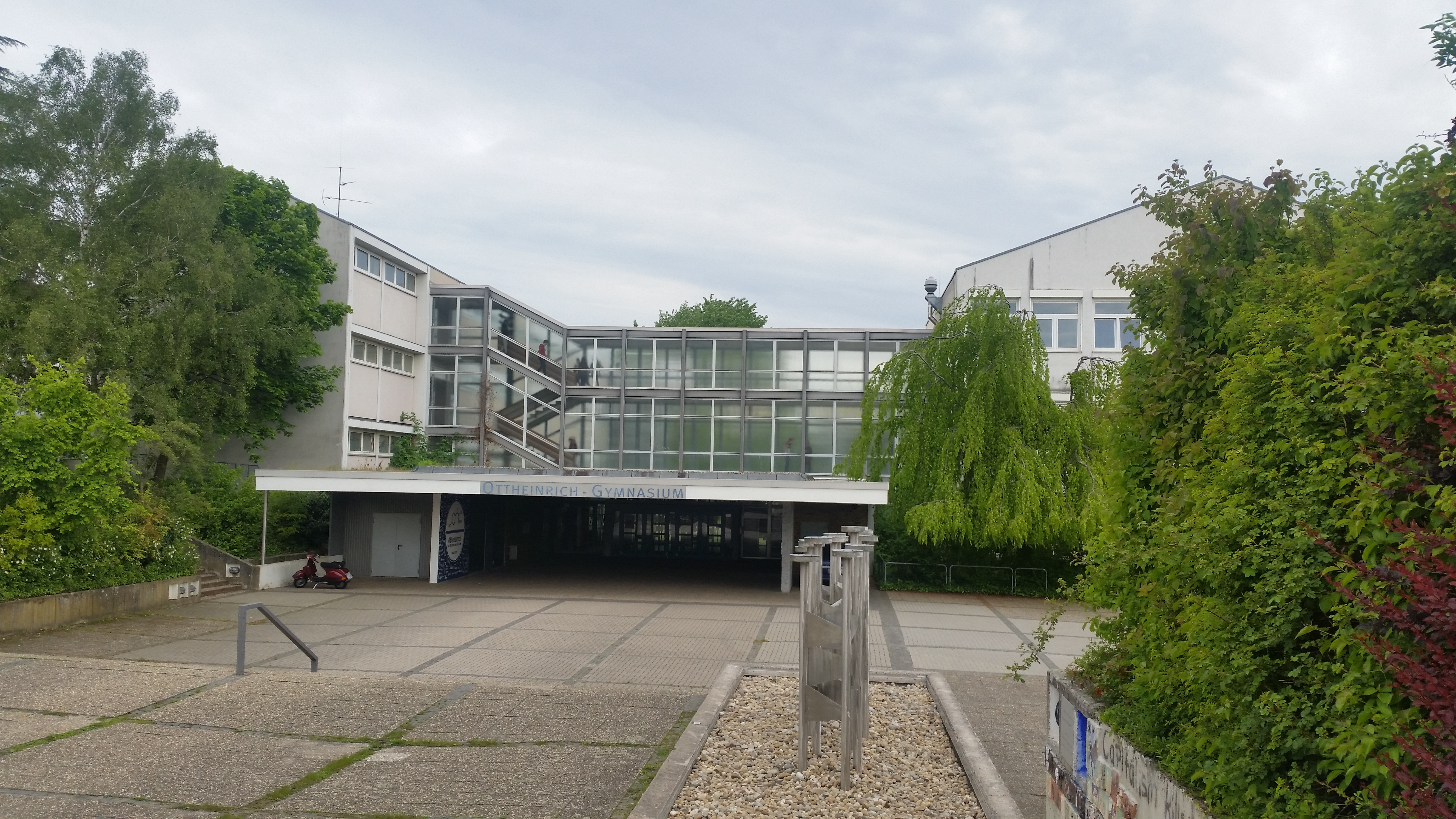 Haupteingang des Ottheinrich-Gymnasium Wiesloch an der Gymnasiumstraße